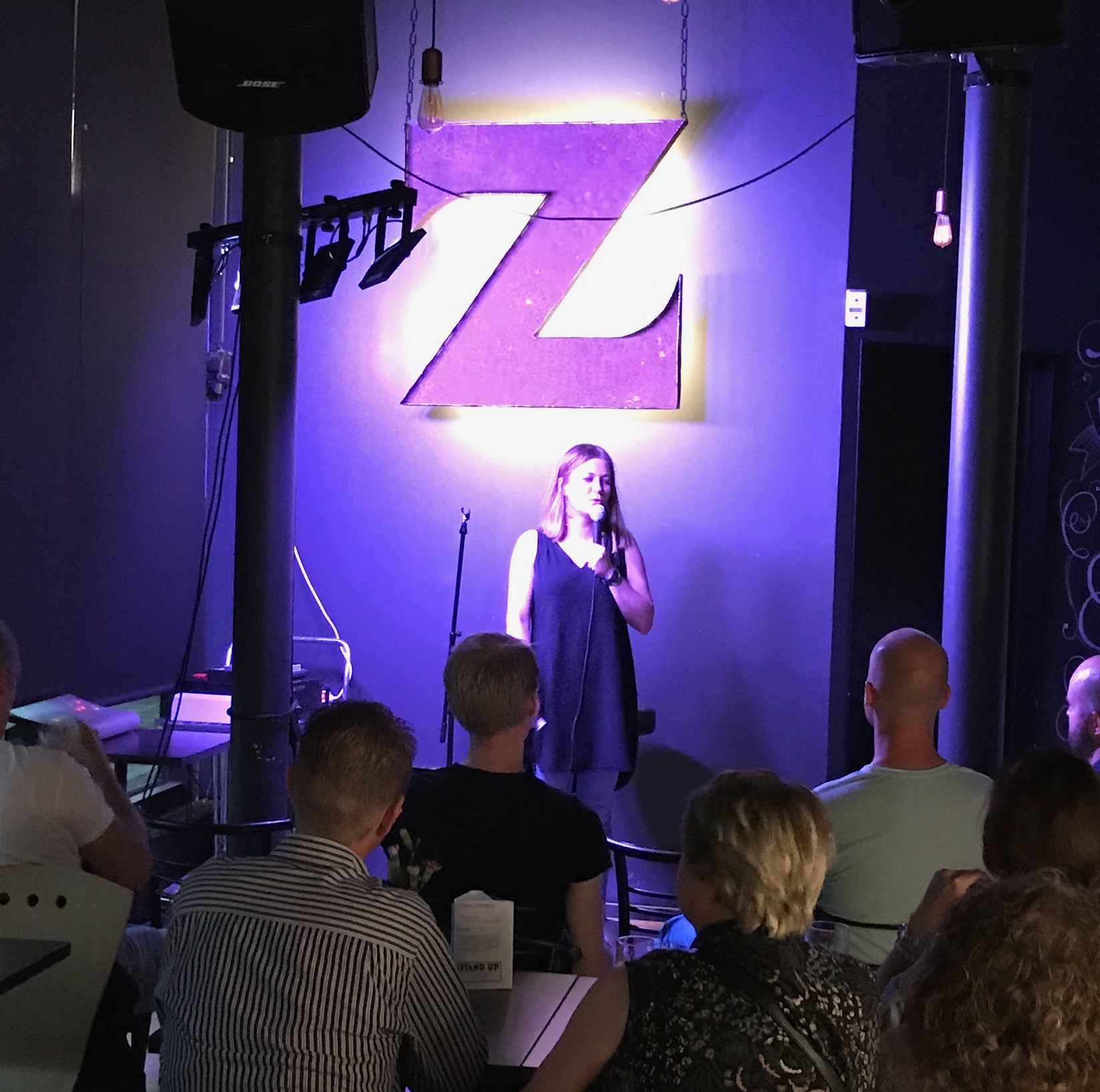 Anna Rimpelä stand-up-keikalla Espoon Cafe Zoceriassa.